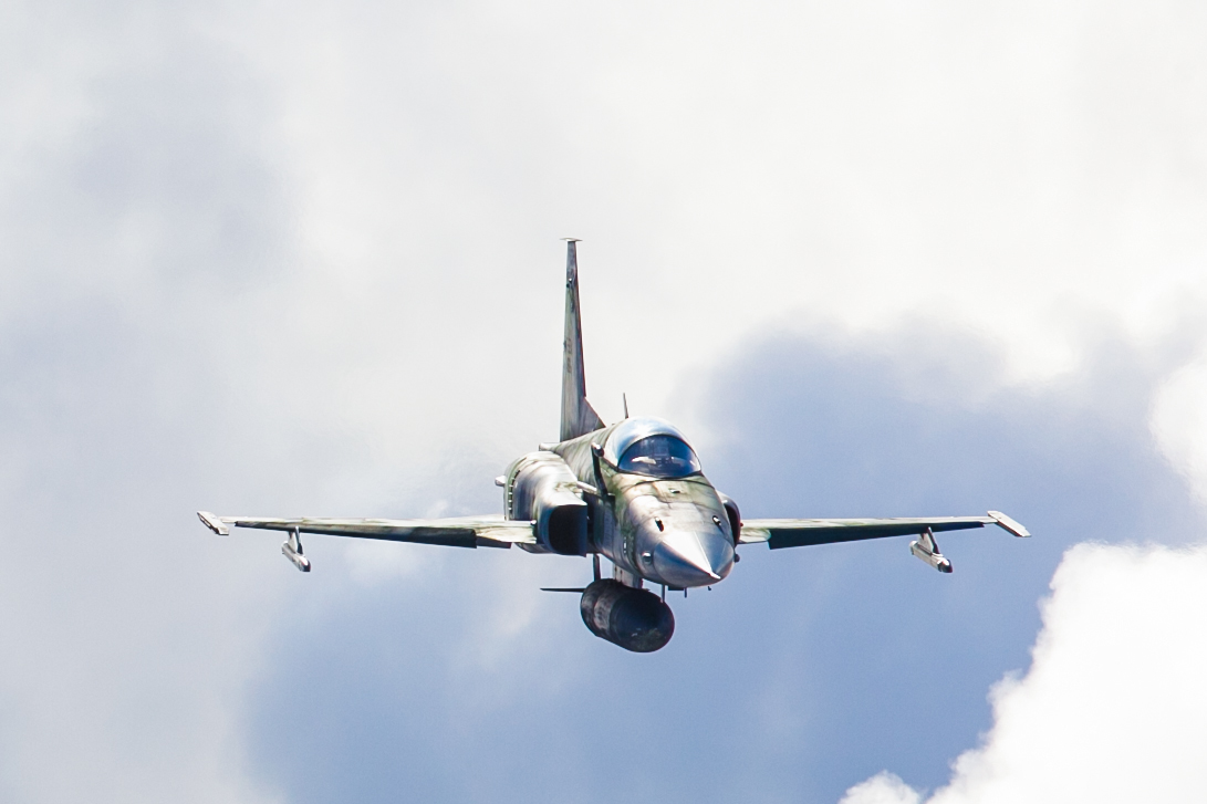 Fotos Felipe Barra/MD